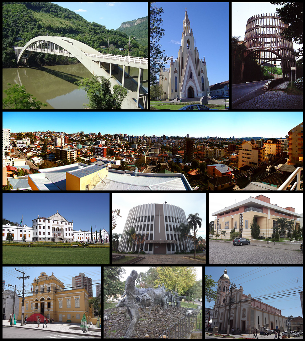 Pontos de Bento Gonçalves.